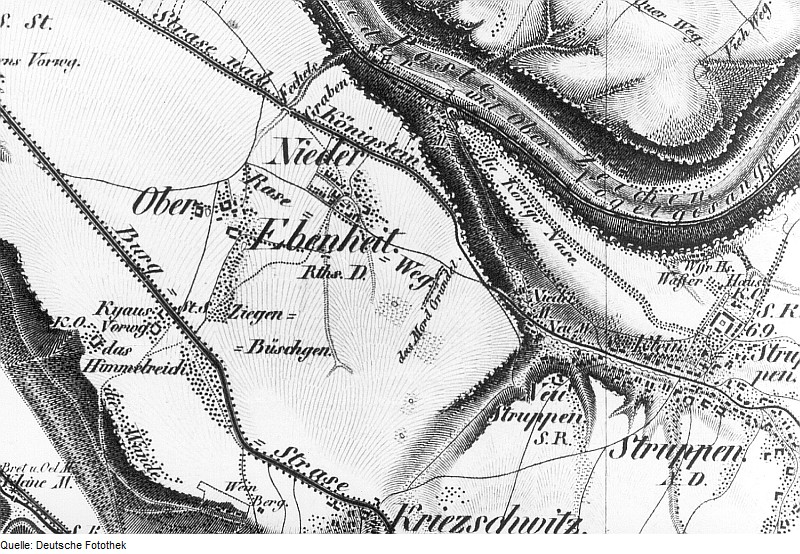 Original image description from the Deutsche Fotothek Struppen-Kleinstruppen. Oberreit, Sect. Dresden, 1821/22